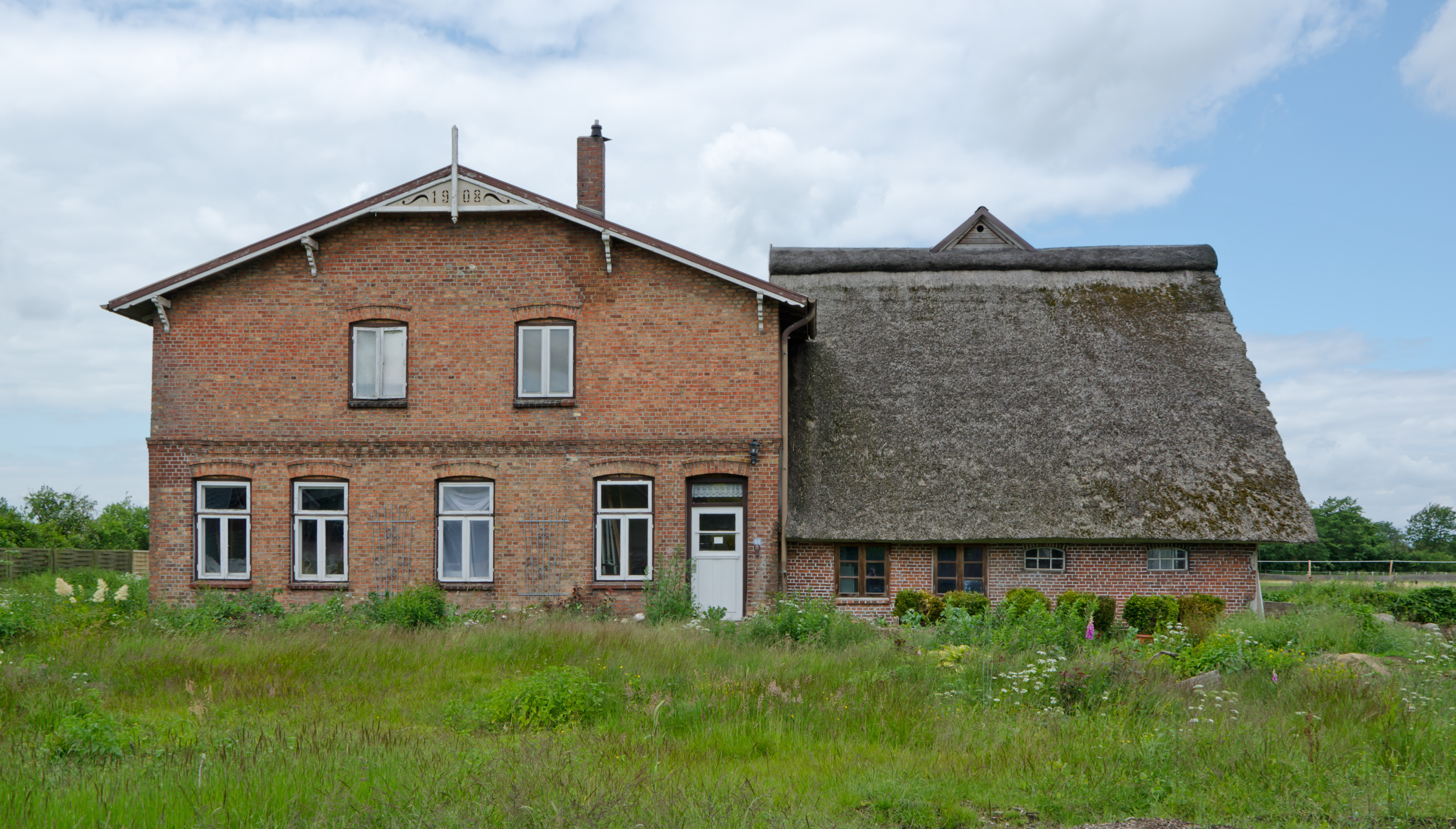 Borstel-Hohenraden Roffloh 68